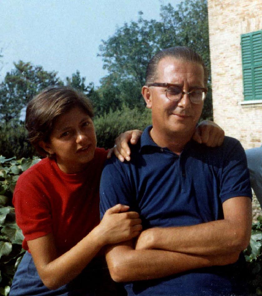 politico, politologo e filoso italiano